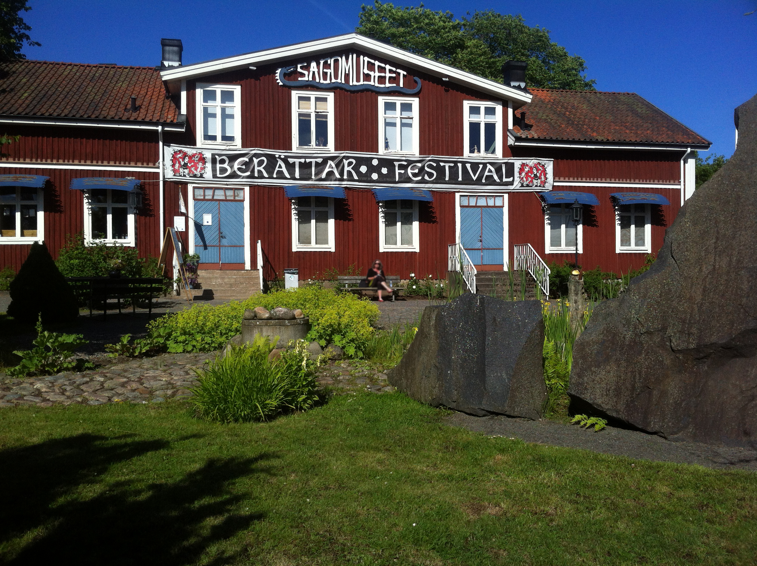 Ljungby sagomuseeum Notera: Bilden har delvis blivit manipulerad, personers ansiktsdrag har blivit borttagna, för att värna om personers egna integritet i den frisläppta bilden.